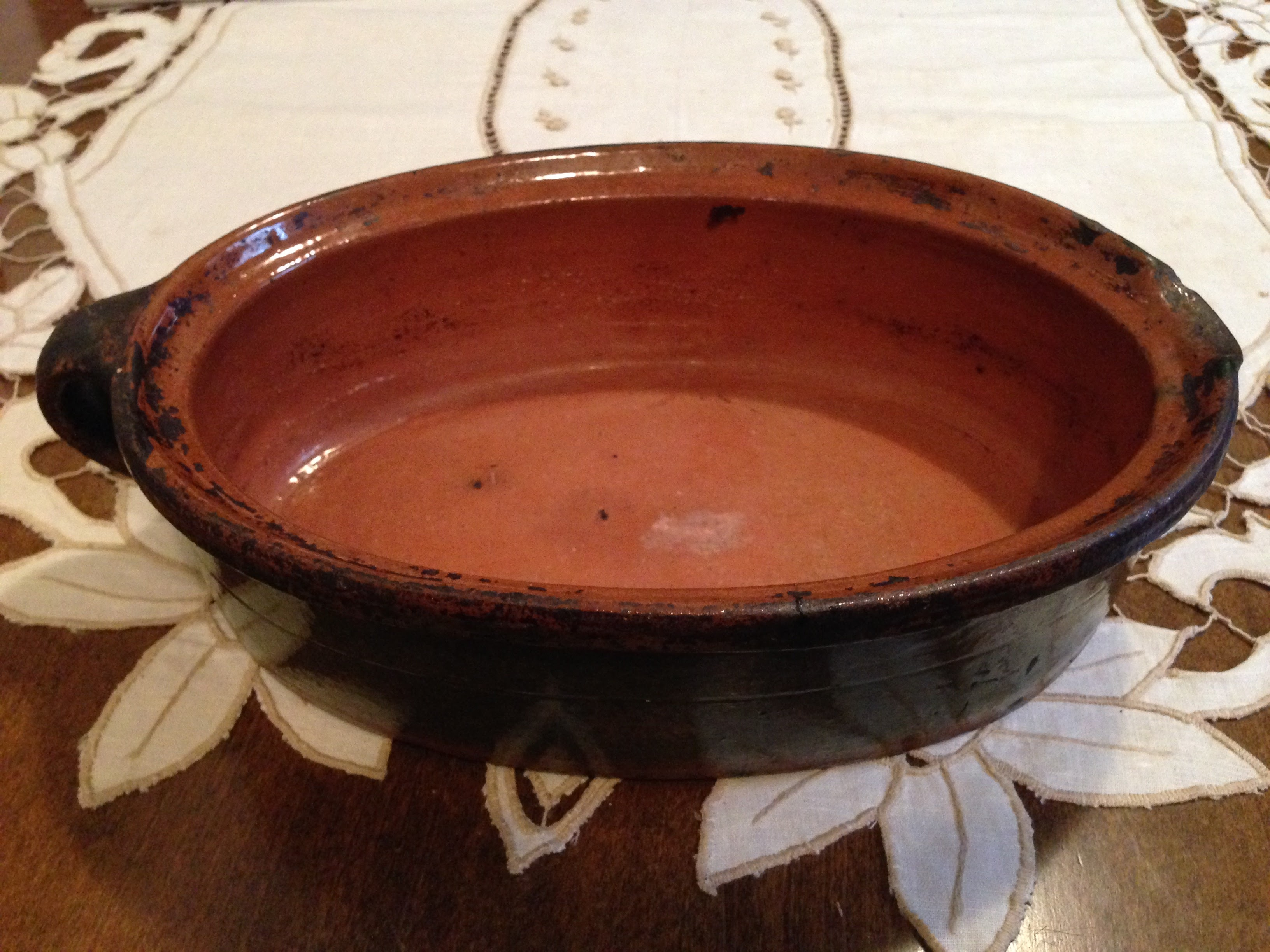 Srpski (latinica): Ђувеч (пекач или уклопн пекица) произведен у Нишу